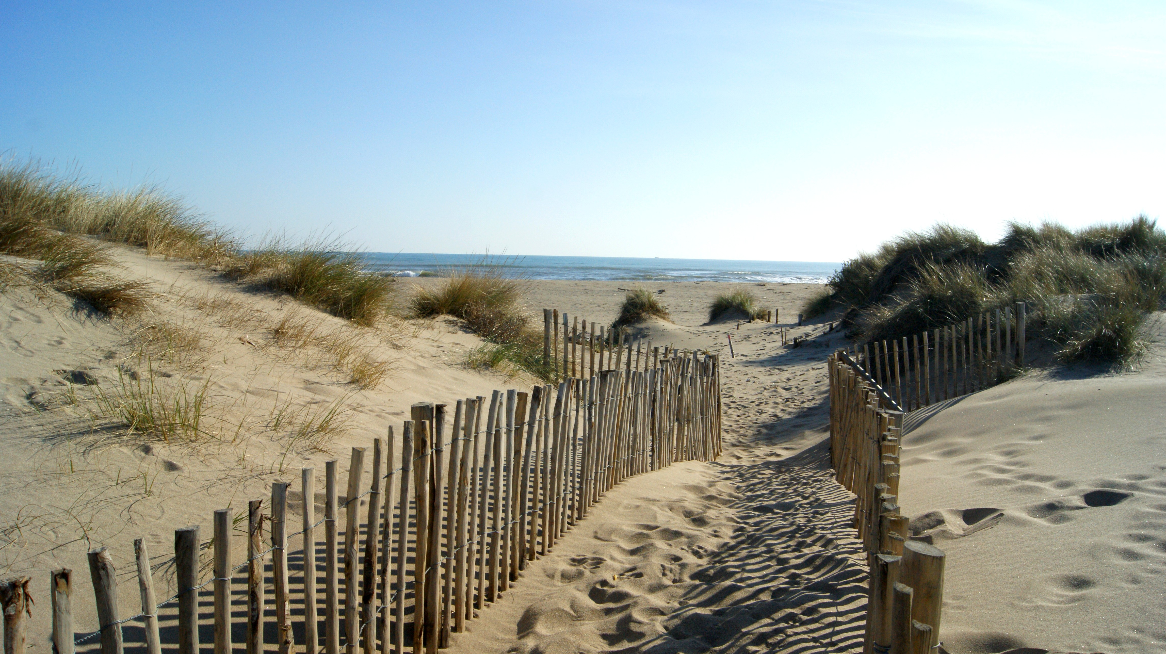 Plage de Vendres (Hérault, France).